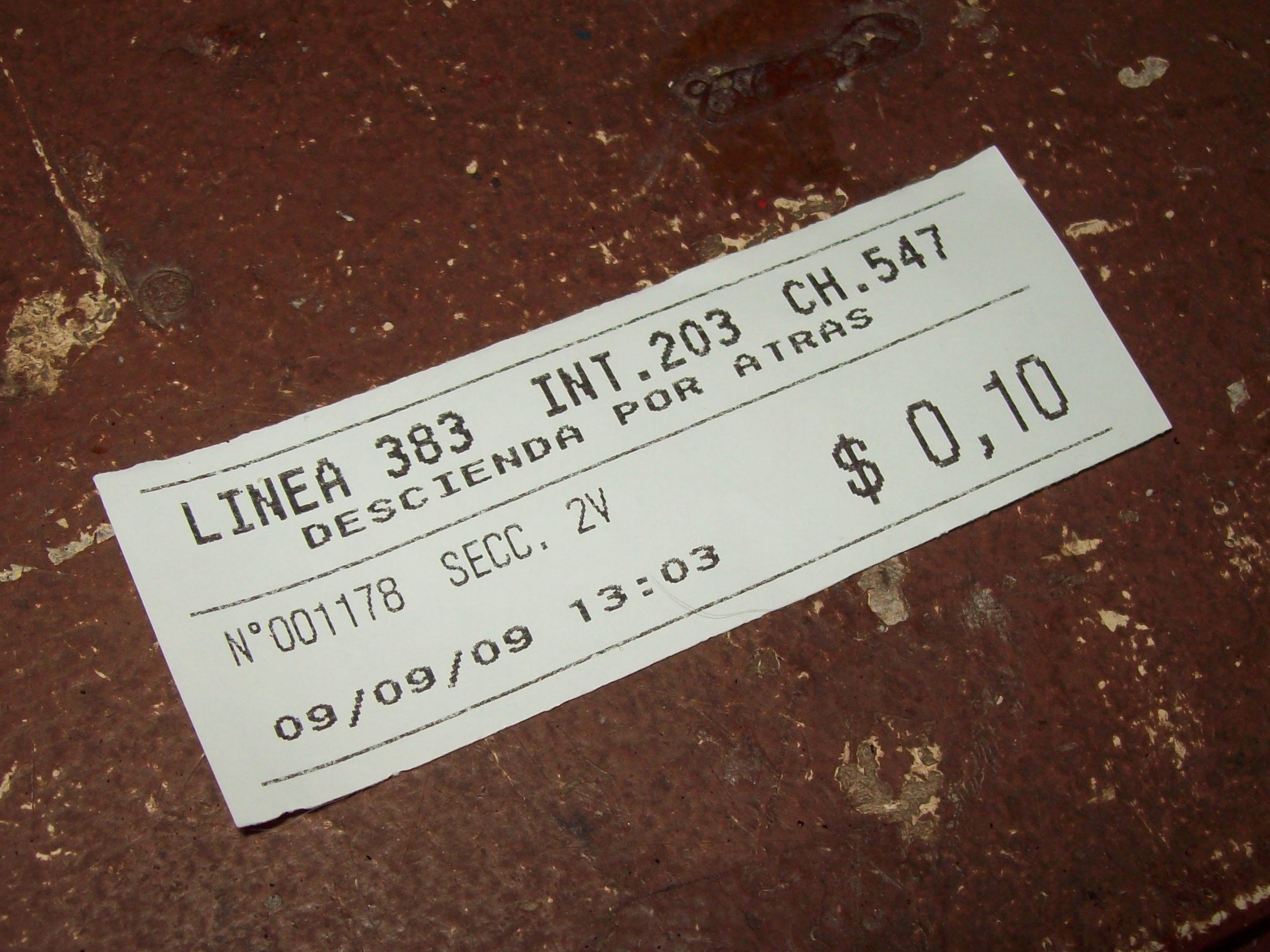 Es una foto de un boleto escolar de la línea 383 (una sublínea del 500) ramal 7M del día 9/09/2009.